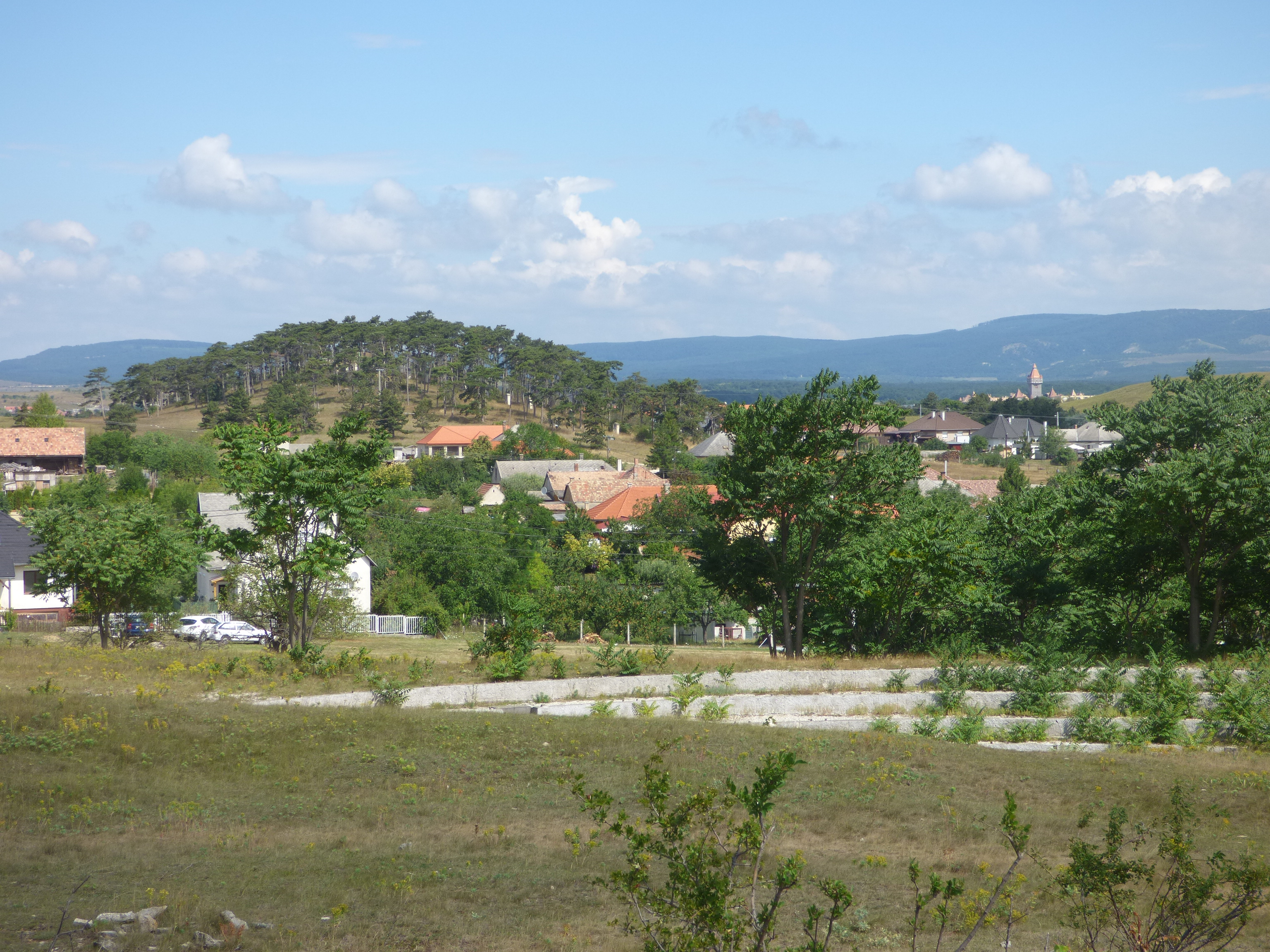 Sóly, a Kálvária a Királyi Kard emlékműtől nézve